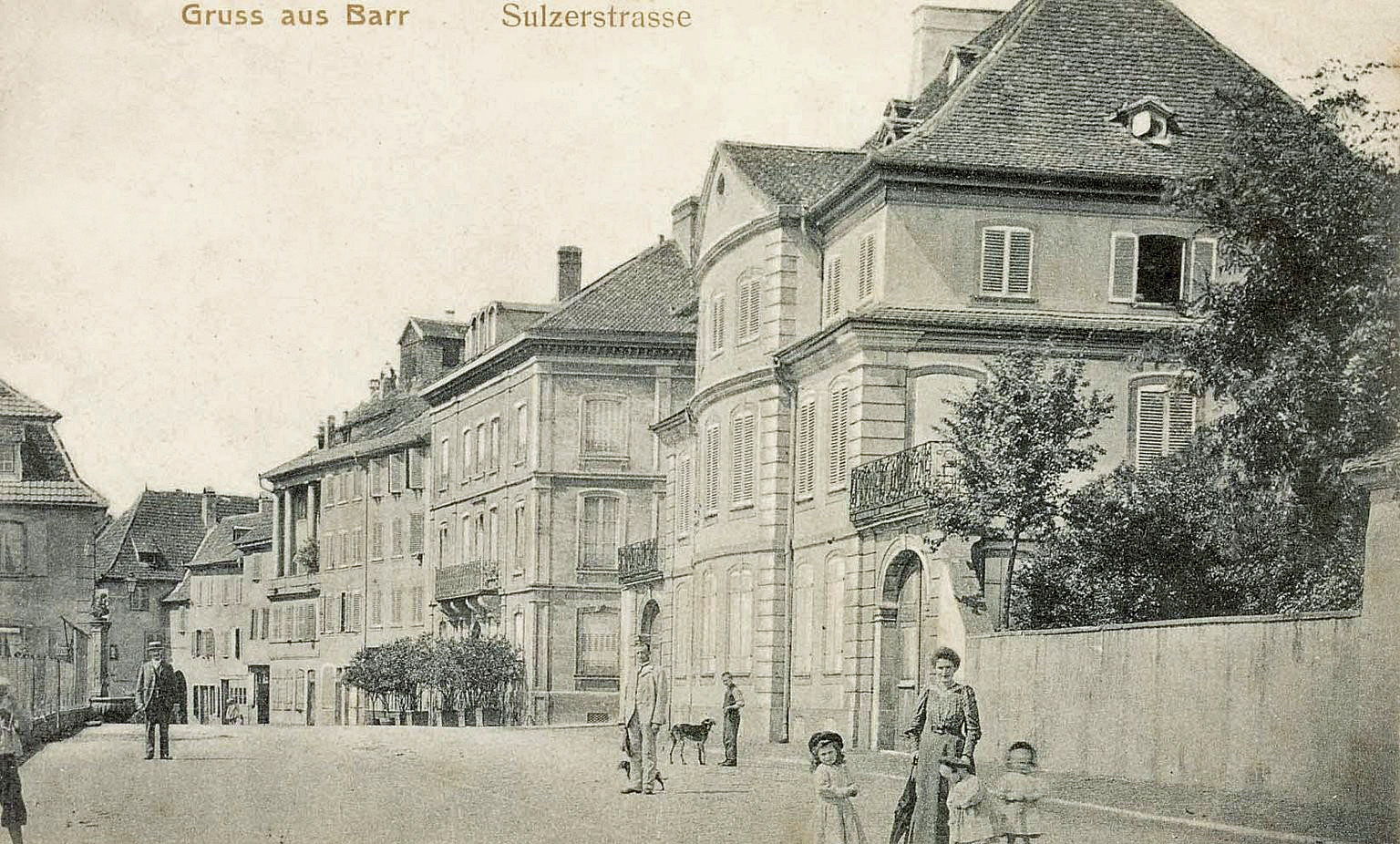 Carte postale Gruss aus Barr-Sulzerstrasse. Bibliothèque nationale et universitaire de Strasbourg